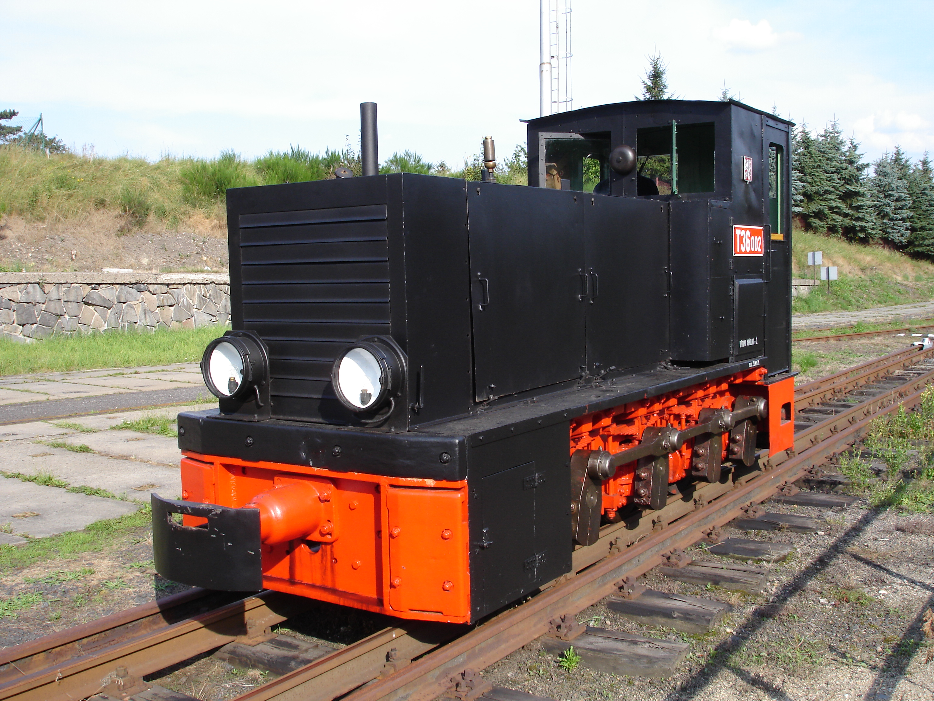 Heeresfeldbahnlokomotive HF130C des Eisenbahnmuseums Frydlant mit CSD-Nummer T36.002